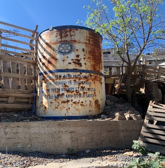 Tanque de abastecimiento de agua Charape de los Pelones, Querétaro, México